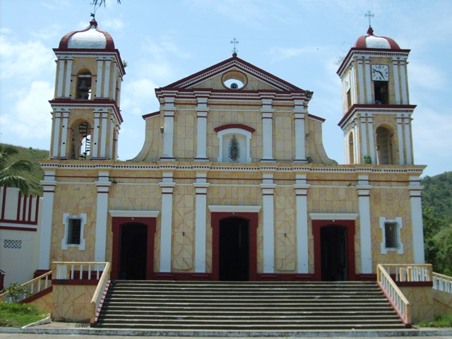 Templo de Guadalupe Huila